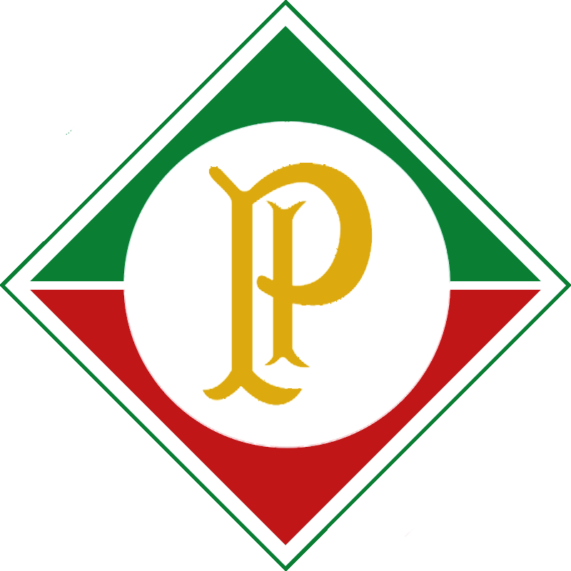 Società Sportiva Palestra Italia - primeiro escudo 1921